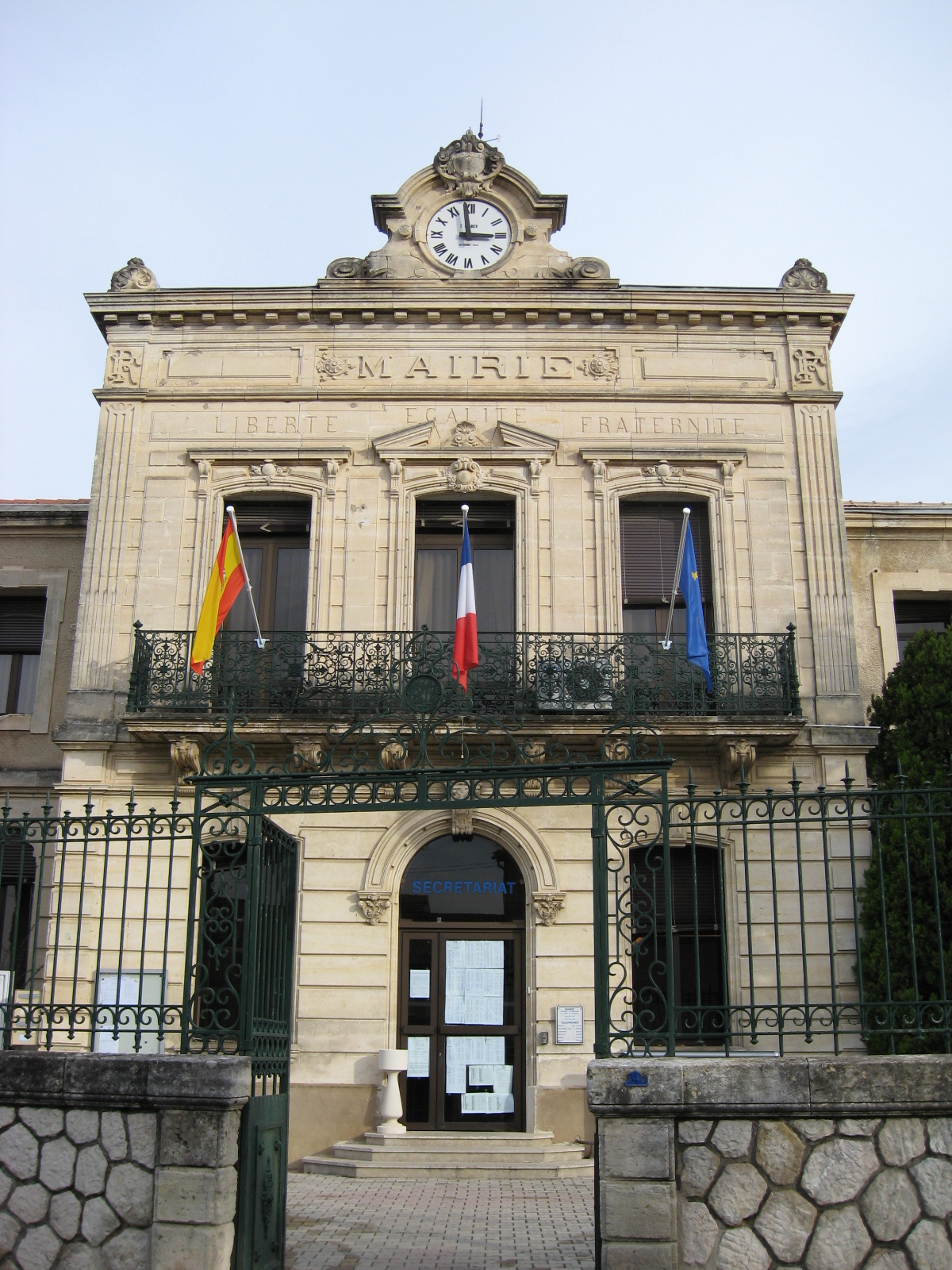 Hôtel de ville de la commune française Saint-Jean de Védas